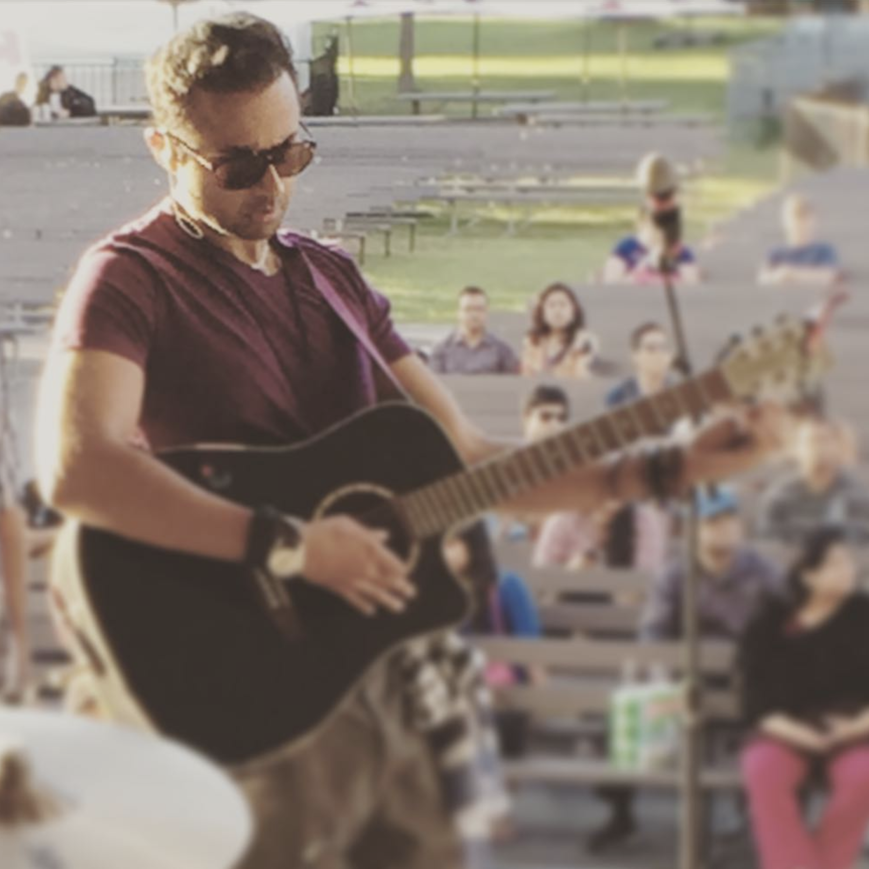 Zameer - Toronto, 2015